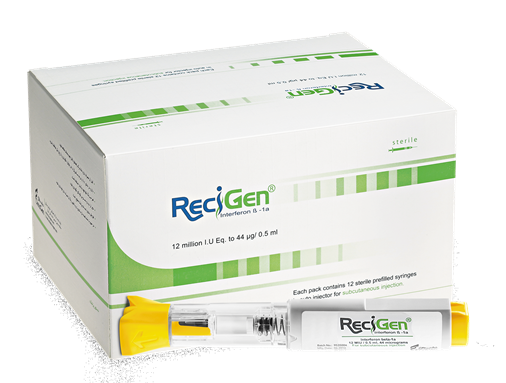 فرم جدید تزریقی رسیژن که برای استفاده بسیار راحت است